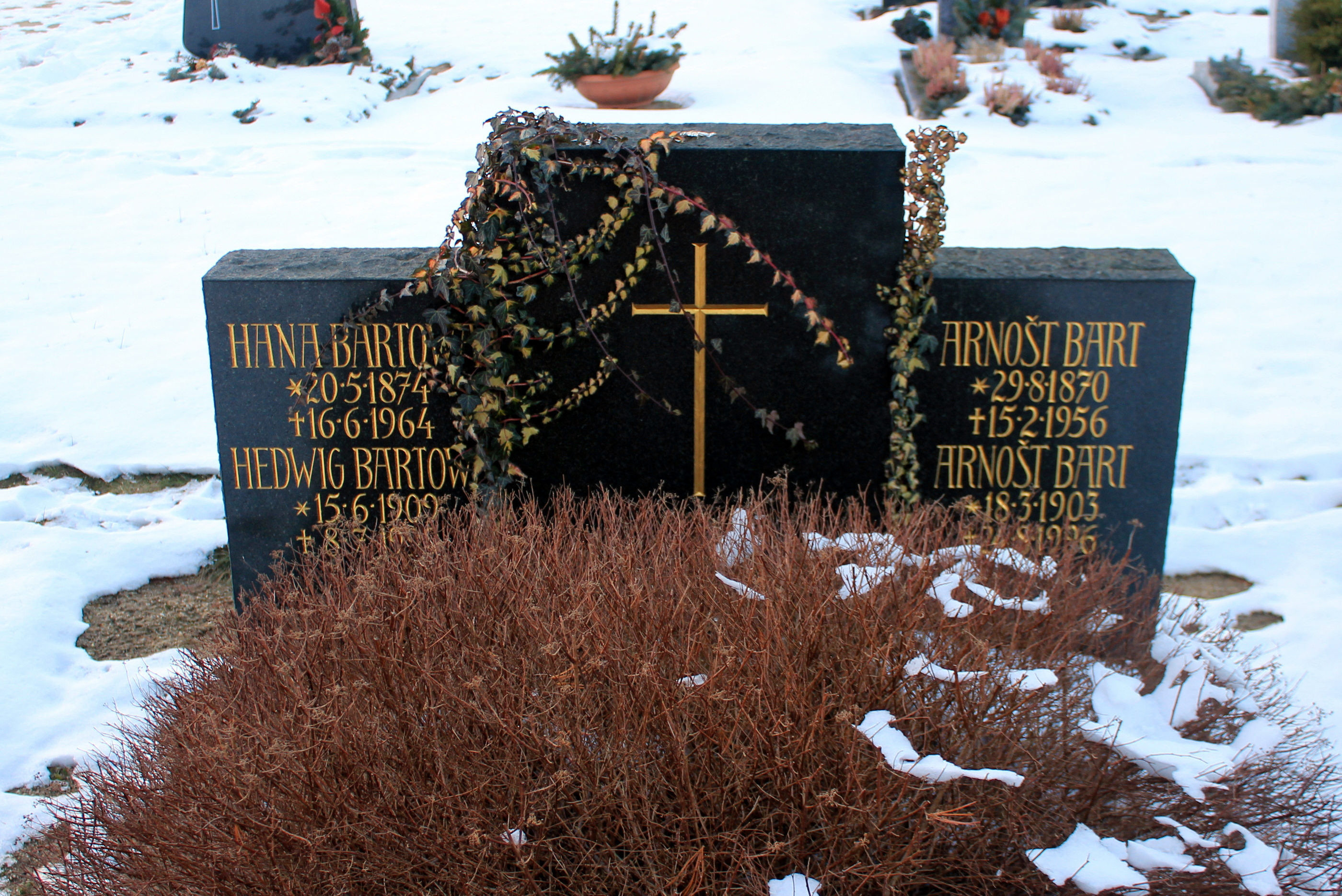 Hornjoserbsce: Row Arnošta Barta na pohrjebnišću w Delnjej Hórce.